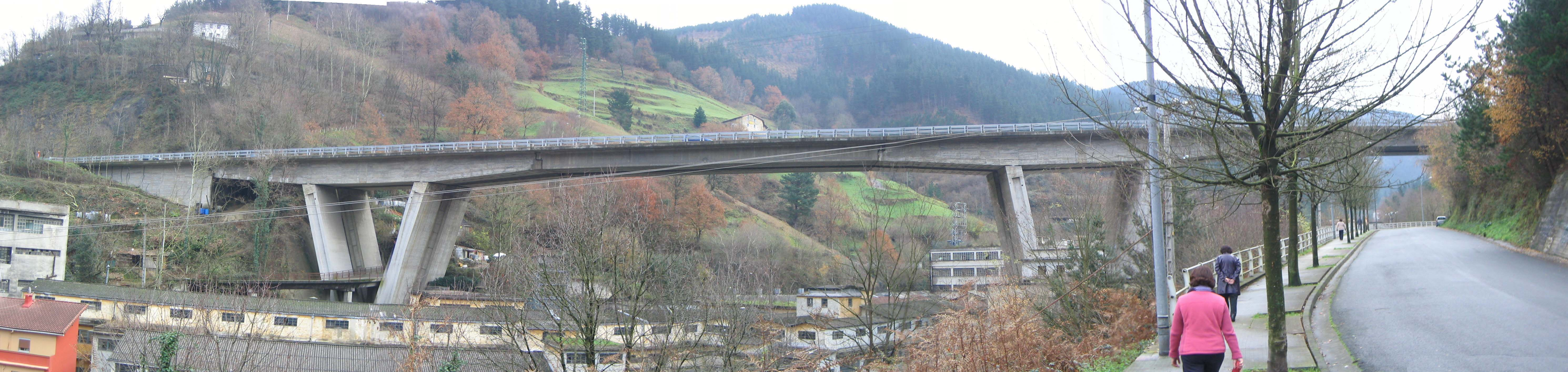 Vista del viaducto de la aputopista AP-8 sobre el barrio eibarrés de Txonta.